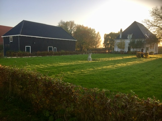 Zijde Helsedijk, voormalig koetshuis (links) met hoofdwoning (rechts) in 2019